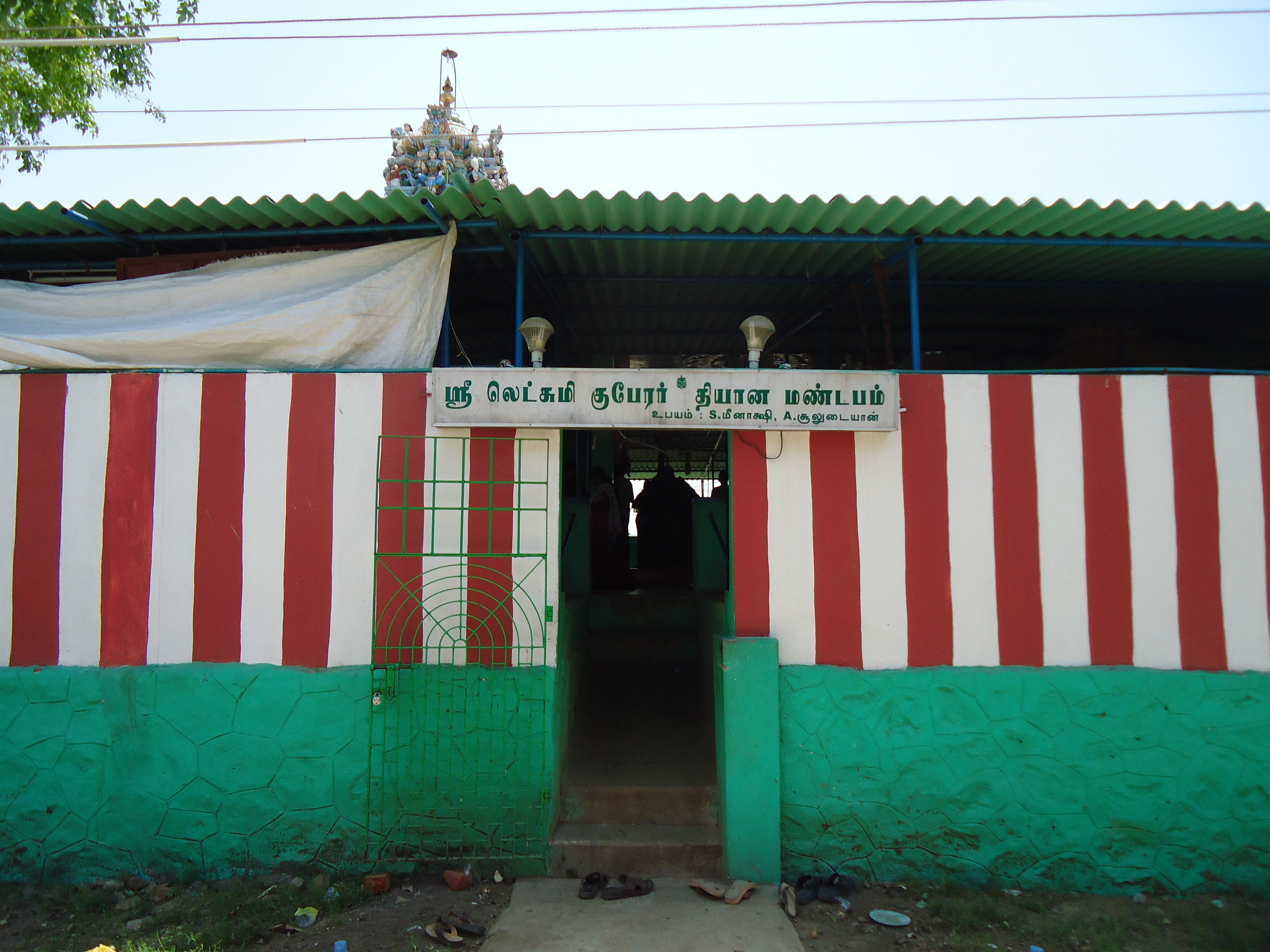 ரத்தினமங்கலம் லட்சுமி குபேரர் கோயில்